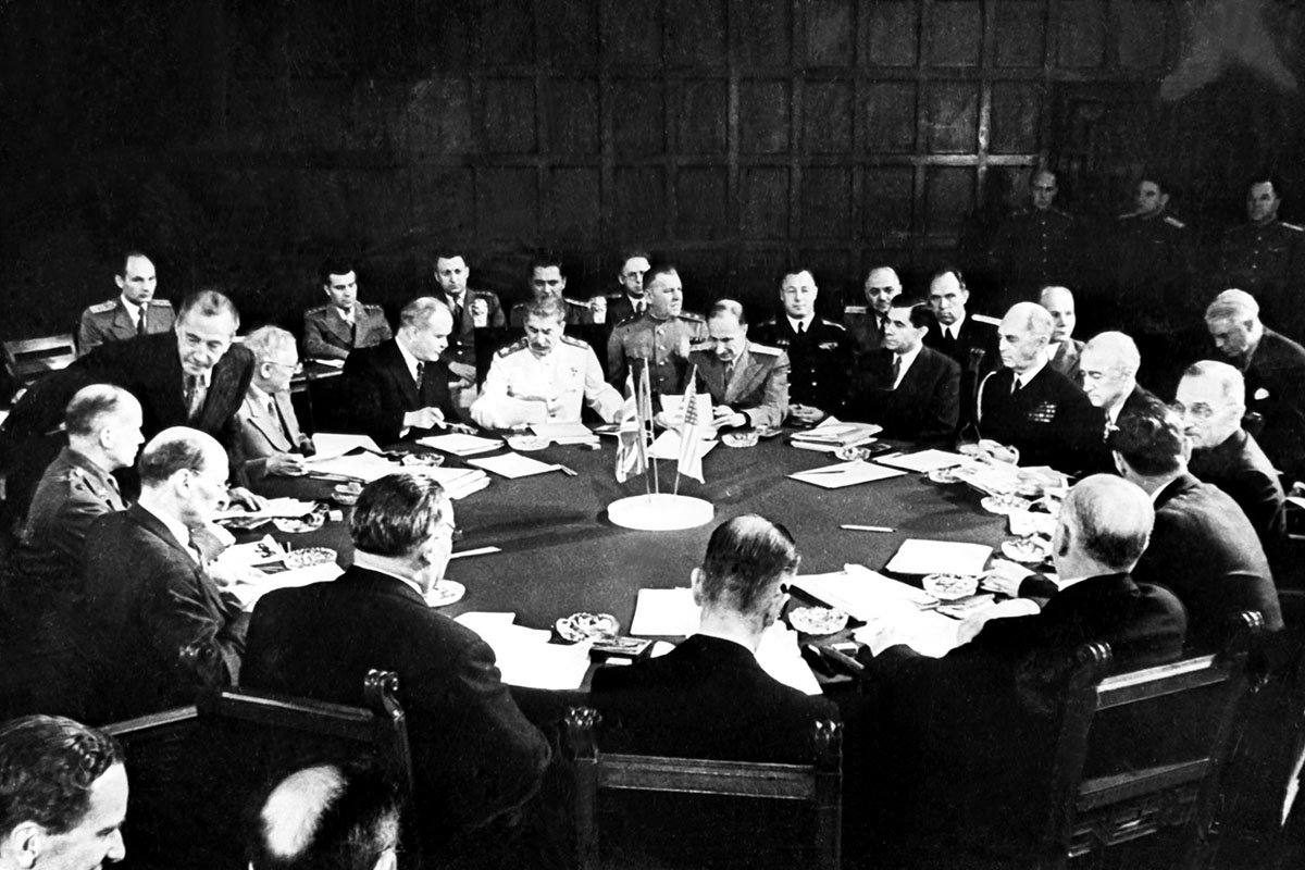 Potsdamer Konferenz, Konferenztisch Zentralbild Potsdamer (Berliner) Konferenz der führenden Staatsmänner der drei alliierten Mächte der UdSSR, Grossbritannien und der USA vom 17. Juli bis 2. August 1945 in Schloß Cecilienhof und Babelsberg. Ihr Ergebnis ist das Potsdamer Abkommen, das die völkerrechtlichen Grundfragen für den Aufbau eines friedlichen, demokratischen deutschen Staates und die Politik der Siegermächte gegenüber Deutschland festlegt. UBz: Mitte hinten Stalin, rechts Truman, links Attlee [Potsdam.- U.a. Clement Attlee, Ernest Bevin, Wjatscheslaw Michailowitsch Molotow, Josef Stalin, William D. Leahy, James F. Byrnes, Harry S. Truman] Abgebildete Personen: Attlee, Clement R.: Premierminister, Vorsitzender der Labour Partei, Großbritannien (GND 118650882) Truman, Harry S.: Präsident, Demokratische Partei, USA (GND 118624210} Leahy, William D.: Admiral, Botschafter in Frankreich, USA Bevin, Ernest: Außenminister, Gewerkschafter, Großbritannien Molotow, Wjatscheslaw Michailowitsch: Außenminister, Sowjetunion (GND 11873461X) Byrnes, James W.: Außenminister, USA Stalin, Josef W.: 1878-1953; Marschall, Vorsitzender des Ministerrates, Generalsekretär der KP, Sowjetunion (GND 118642499)